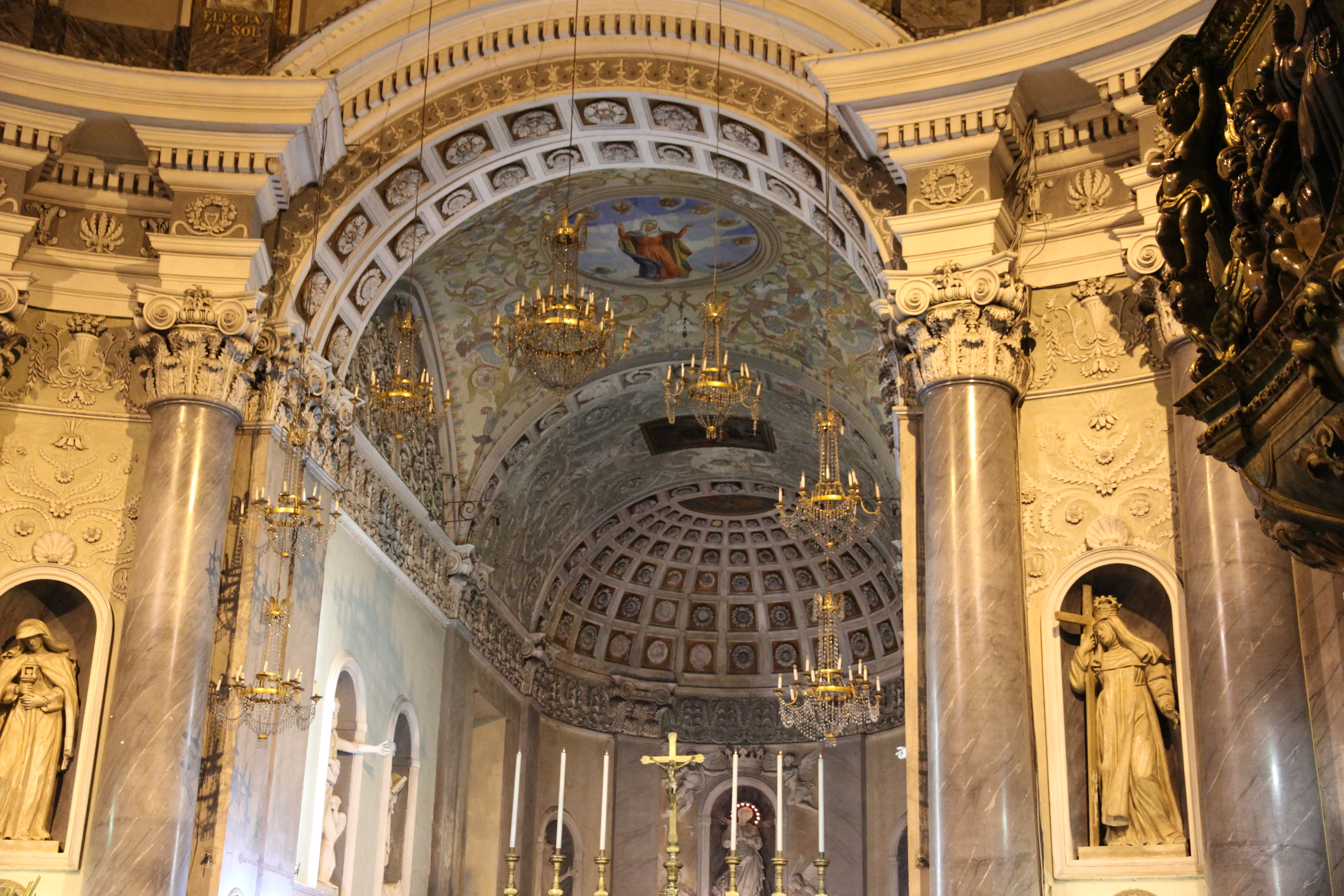 Sassari - Chiesa di Santa Maria di Betlem